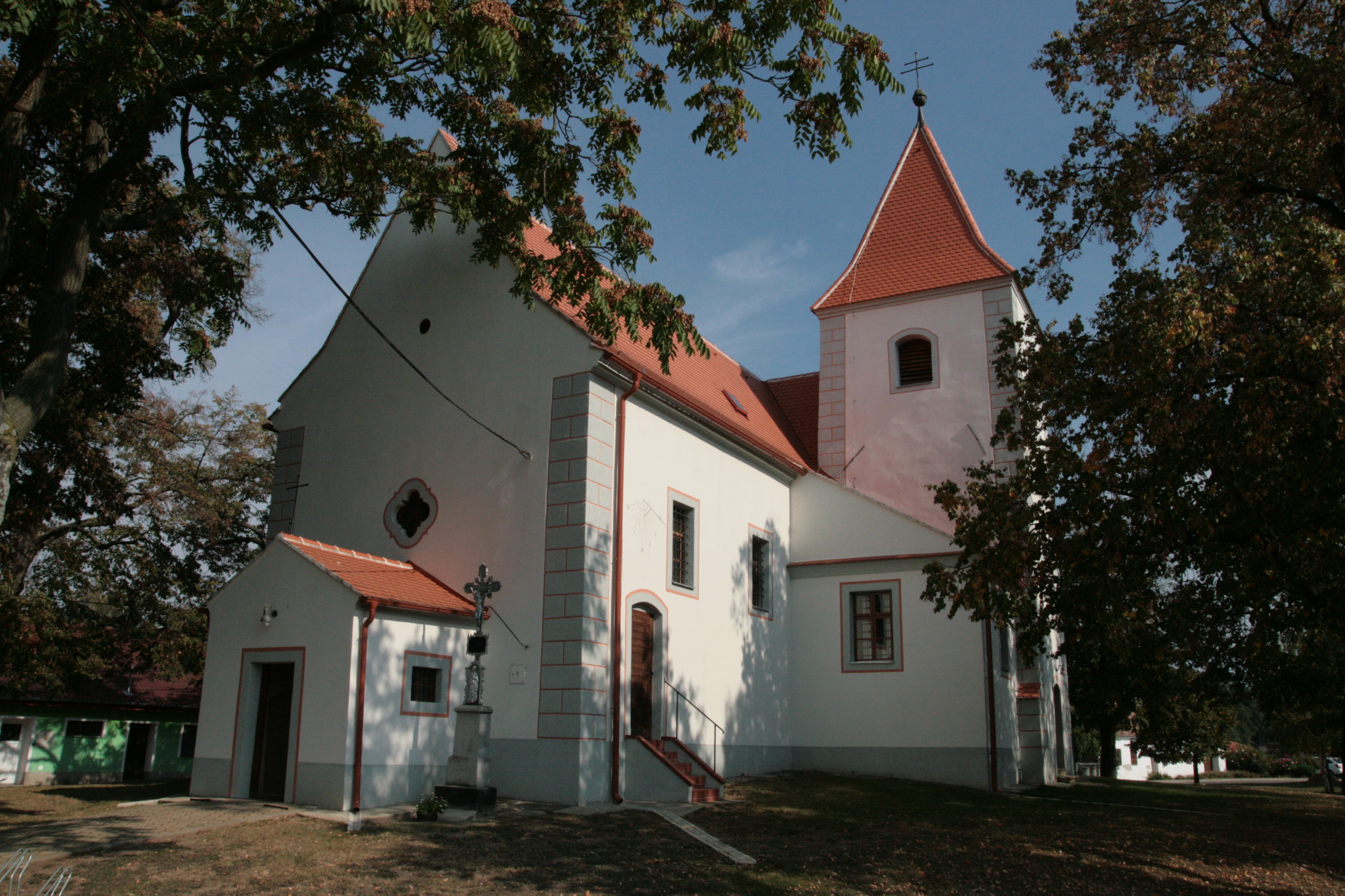 Obec Valtrovice v okrese Znojmo. Kostel sv. Jana Křtitele uprostřed návsi.